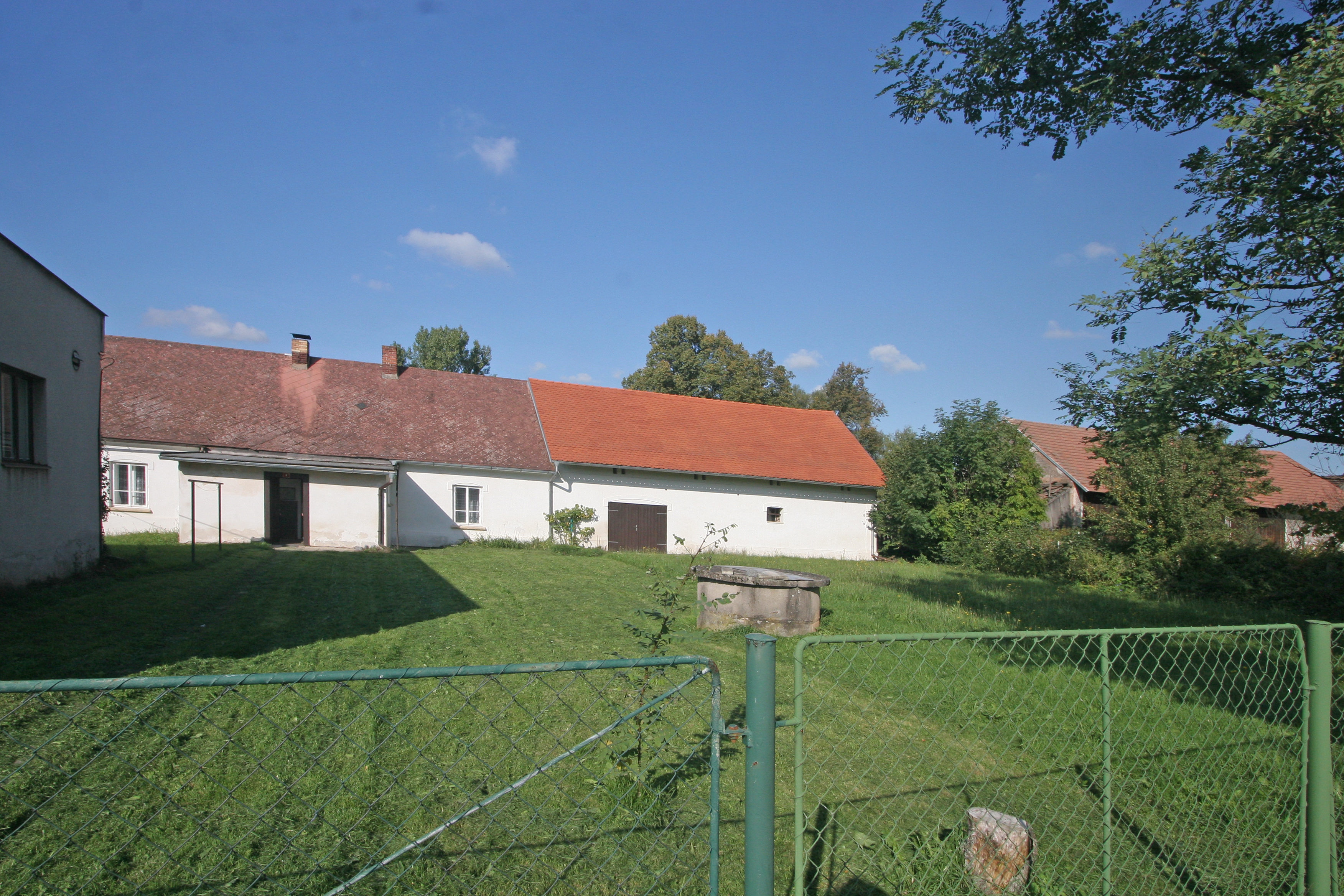 Starý Dvůr čp. 4